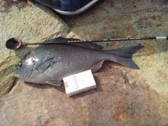 クロメジナ（尾長グレ） 和歌山県白浜町地磯にて